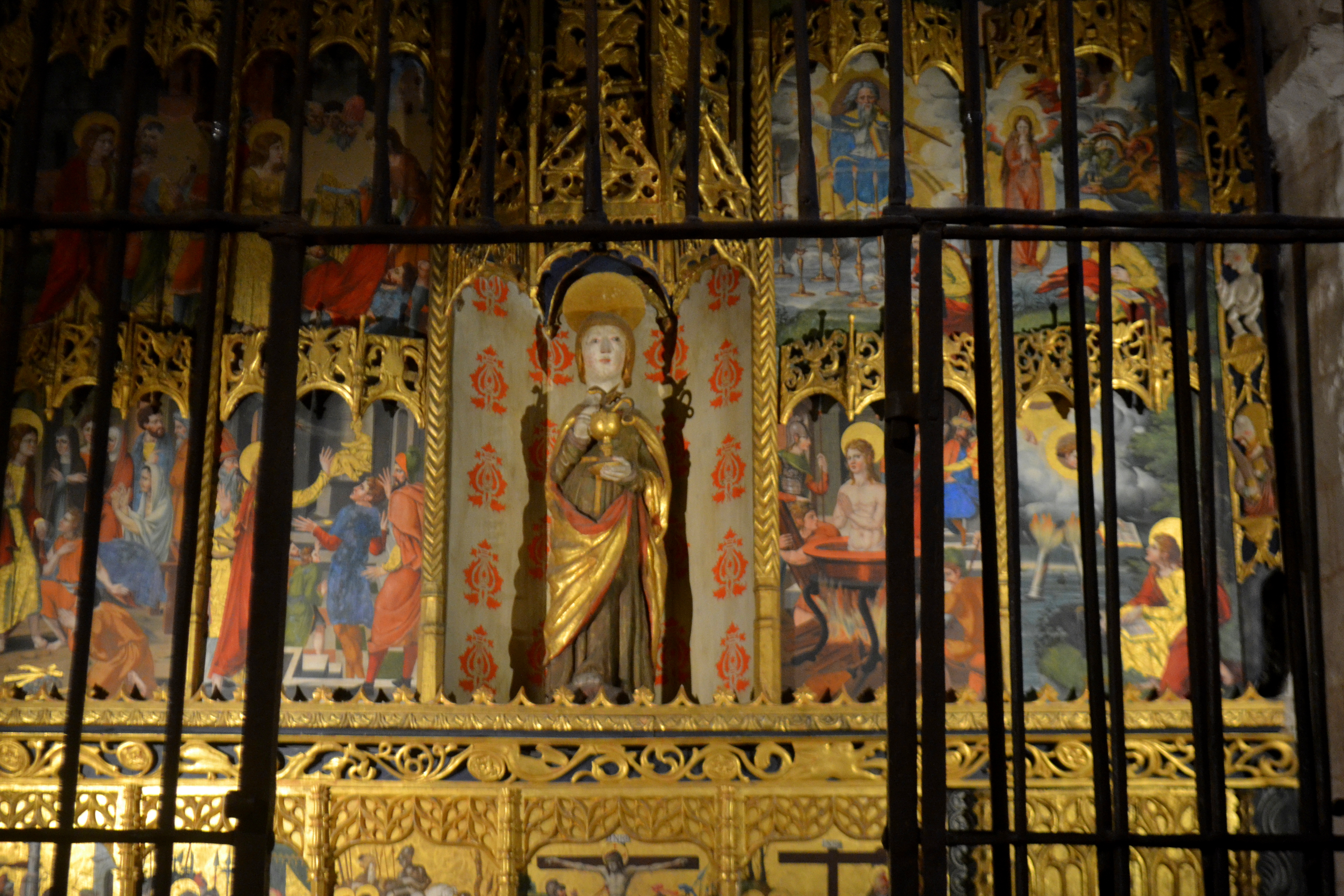 Església de Sant Joan de Caselles